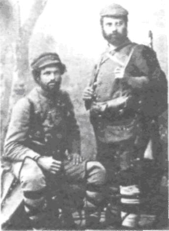 Kocho_Molerov and Dimitar Todev